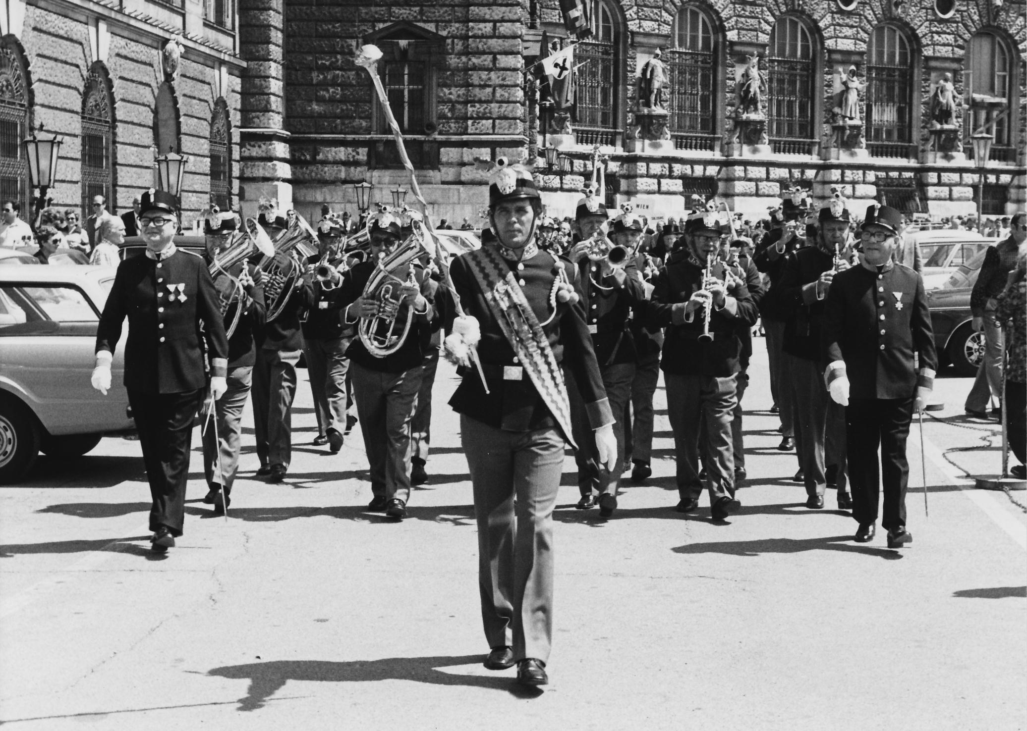 Juni 1977